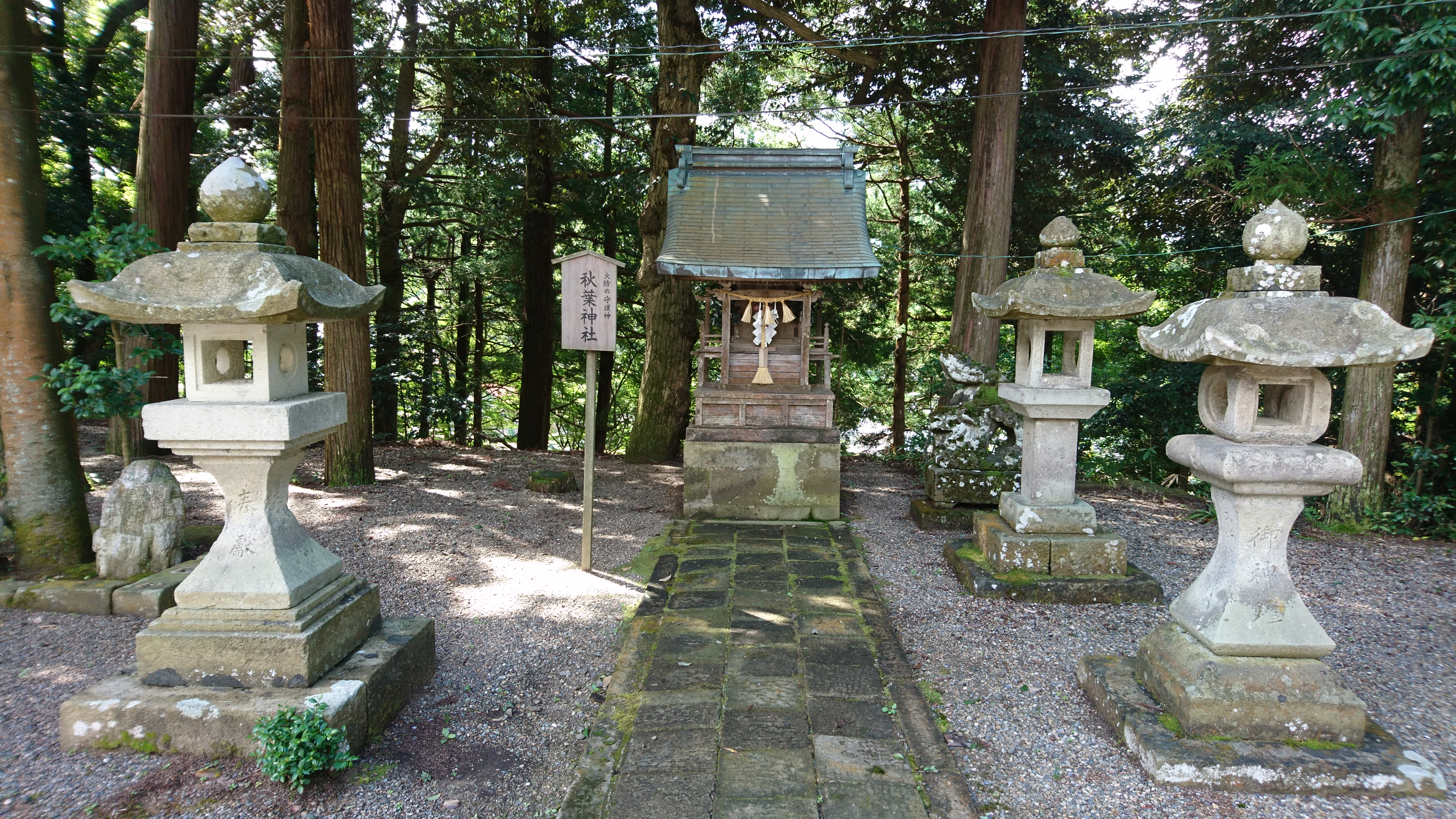 京丹後市峰山・金刀比羅神社の末社・秋葉神社